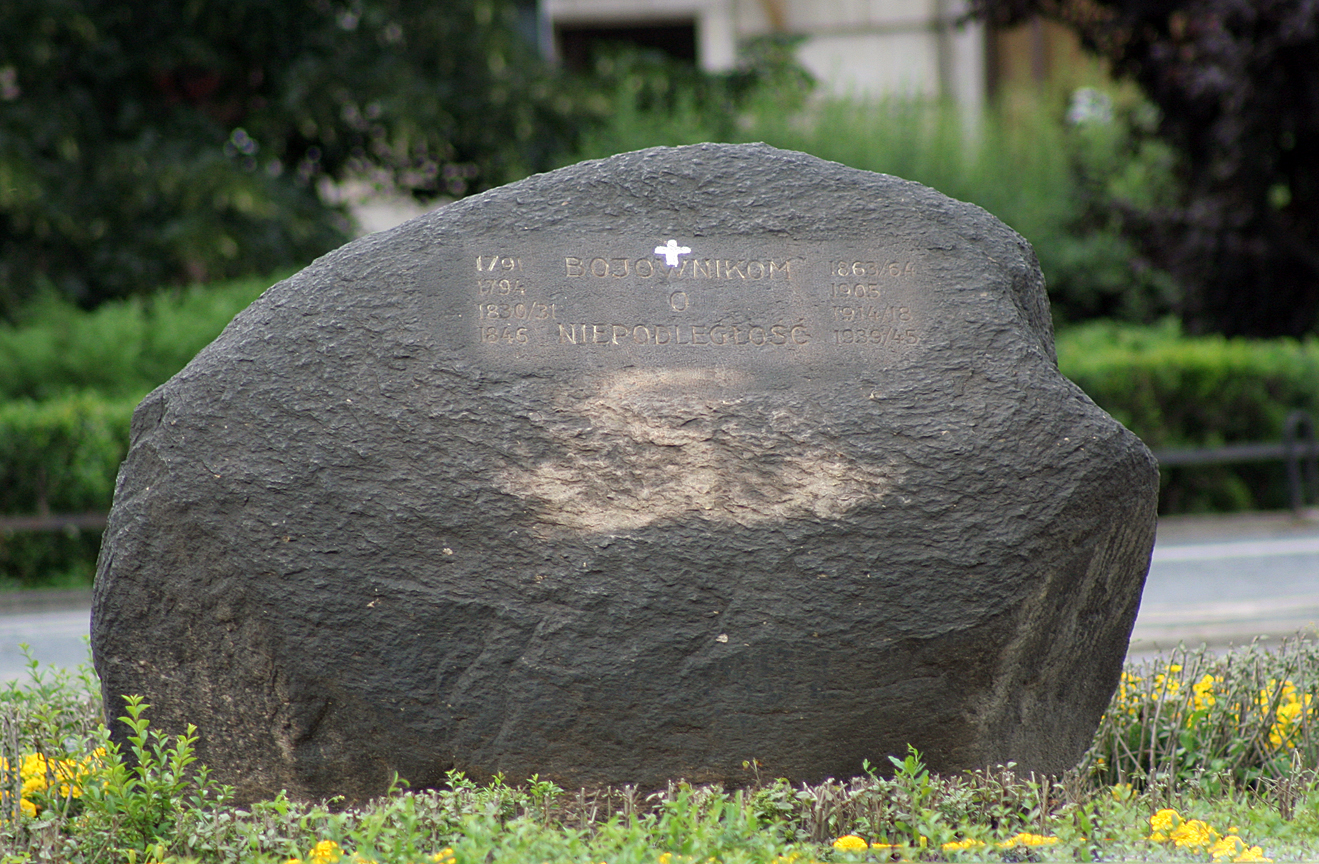 Kamień pamętkowy przy placu Kościuszki